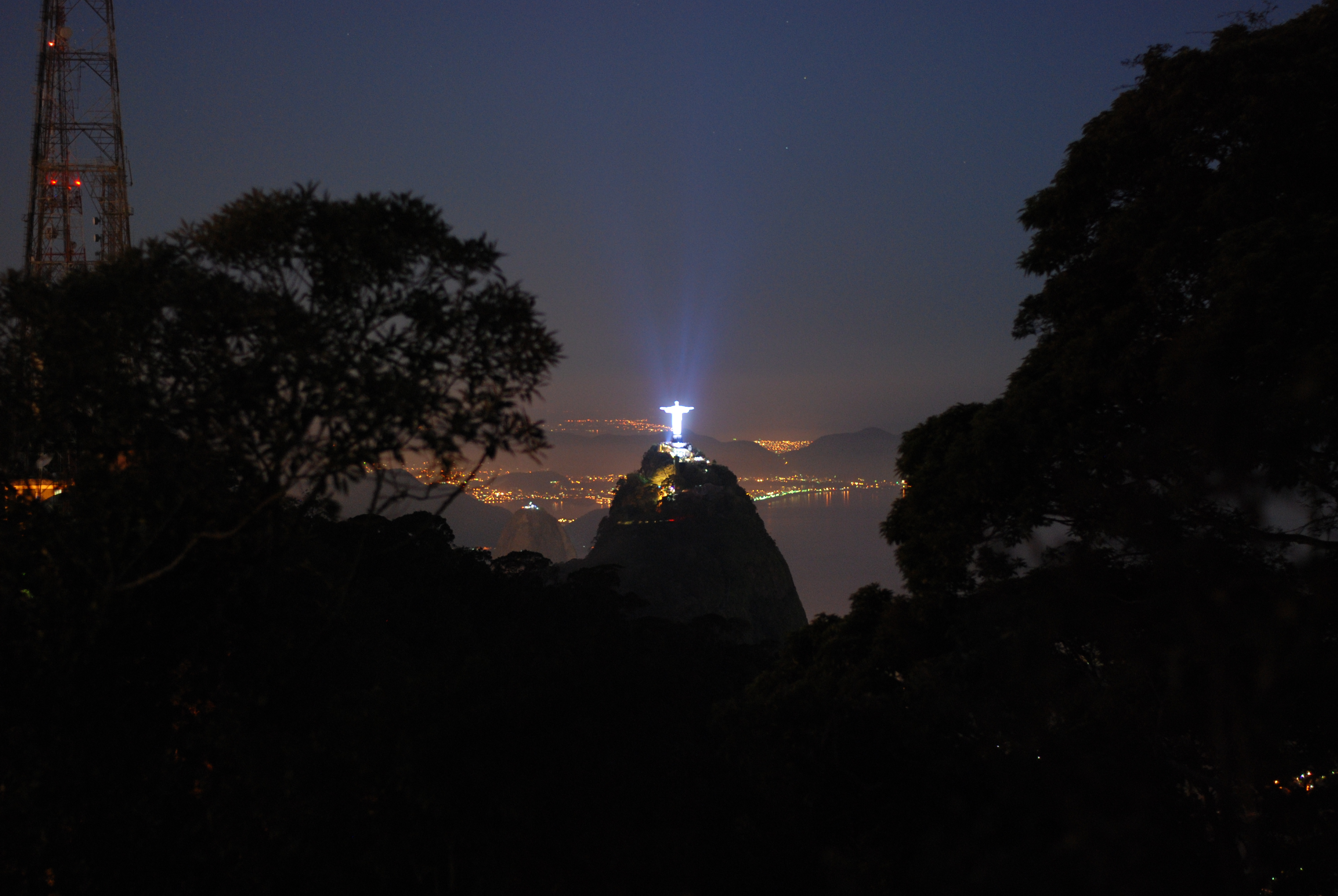 Iluminação do Cristo Redentor.